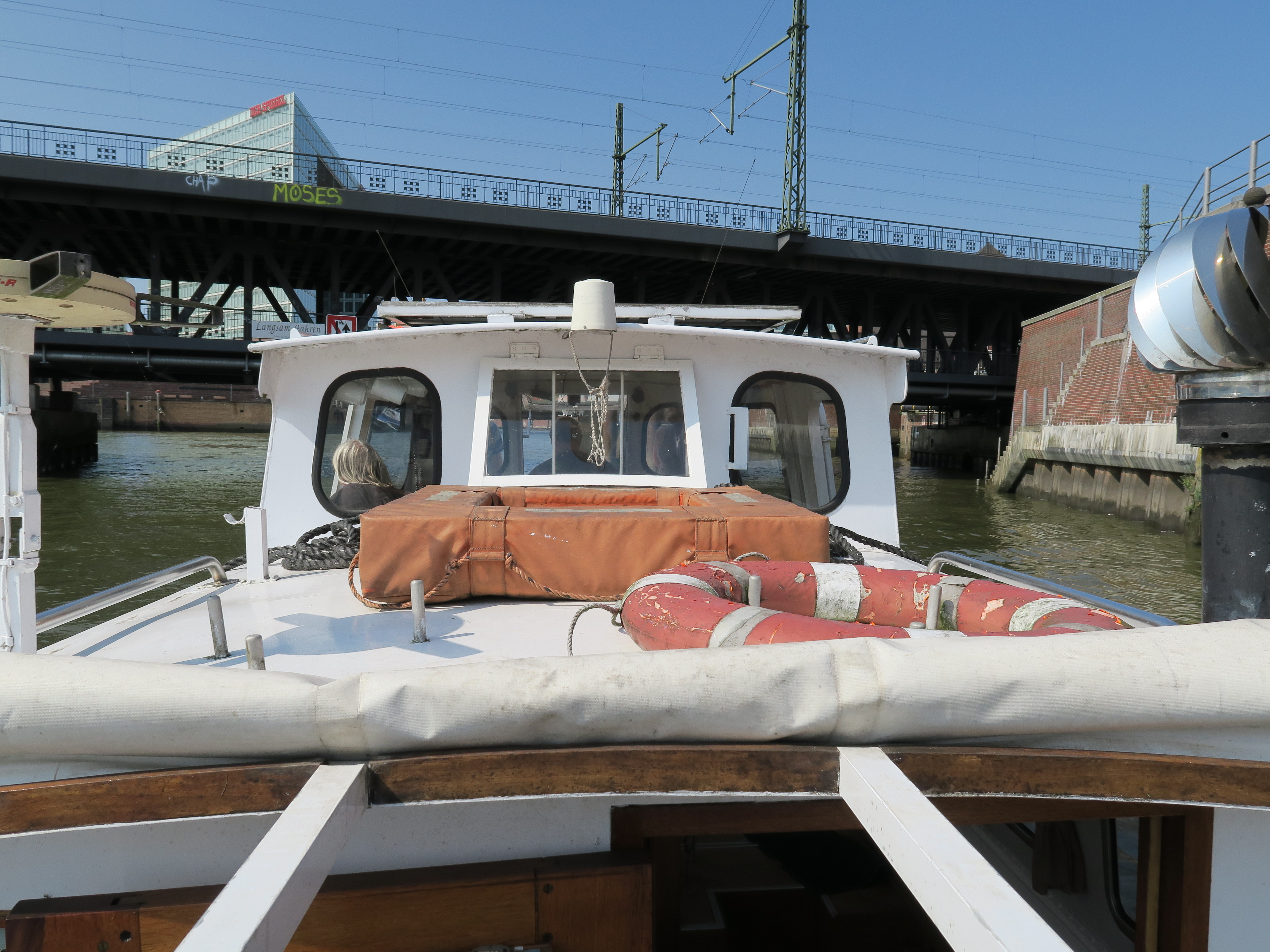 Barkasse Olga an der Oberhafenbrücke